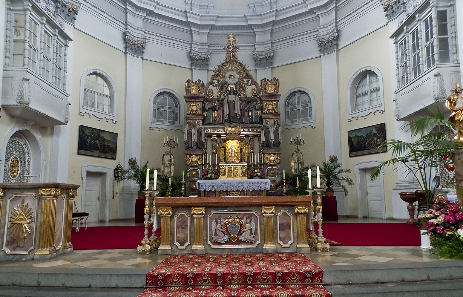 St. Theresia, München, Altar.